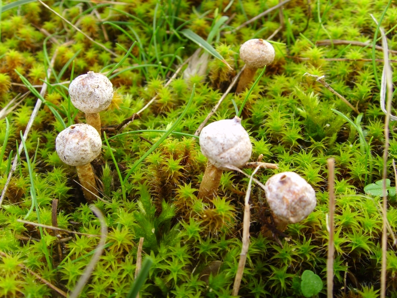 Groupe de Tulostoma brumale, dunes de Trez Goarem (Primelin, Finistère, France)